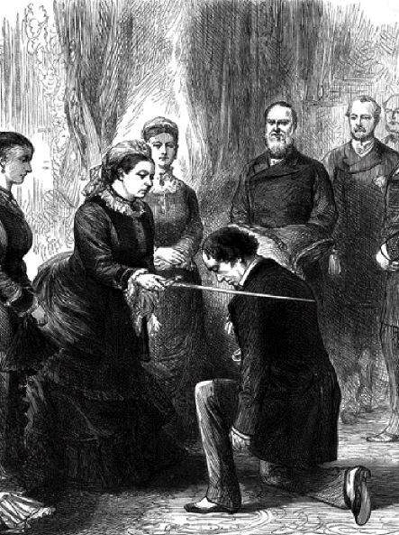 Disraeli Receives Order of the Garter